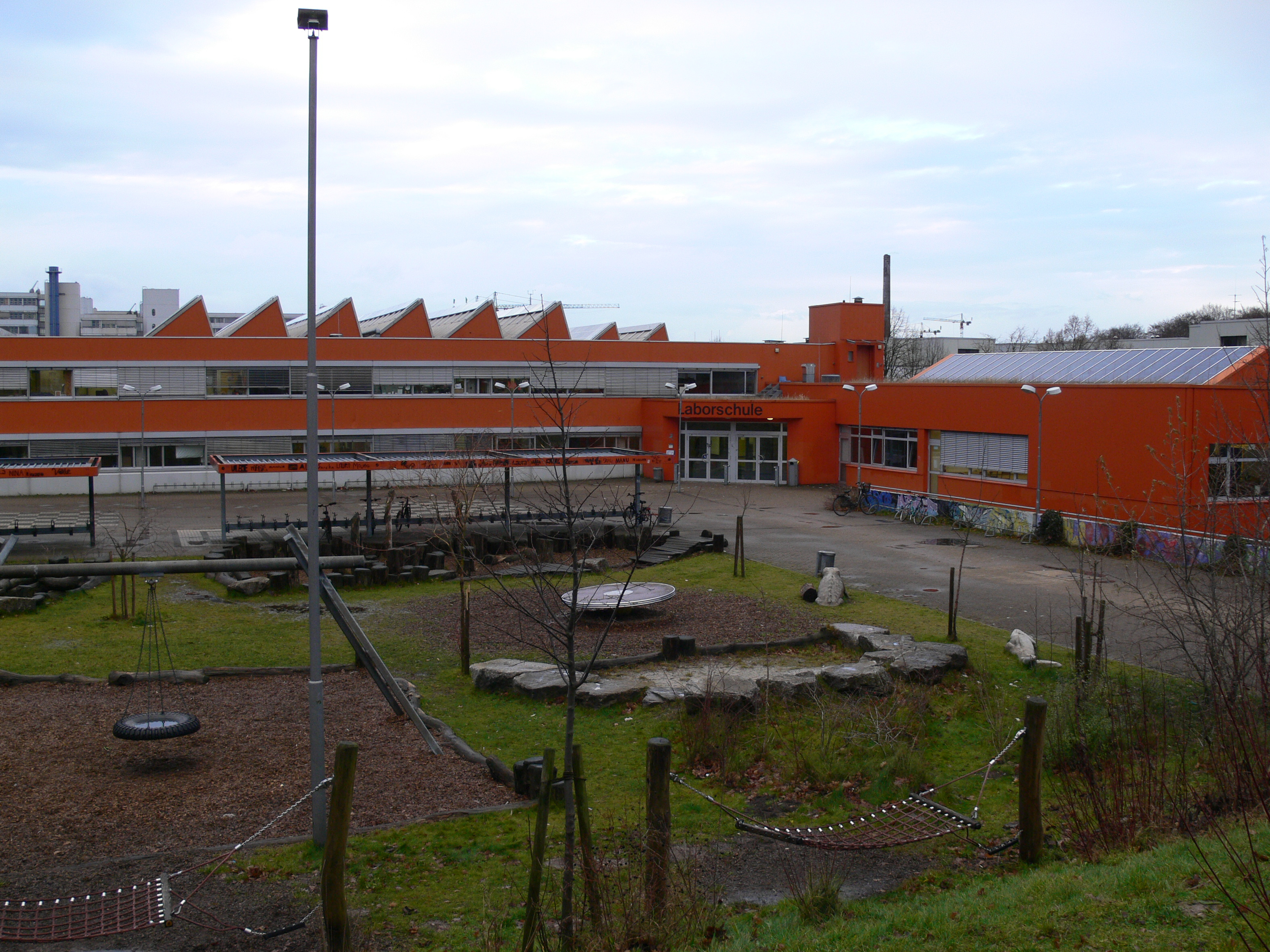 Laborschule Bielefeld in der Universitätsstraße 21